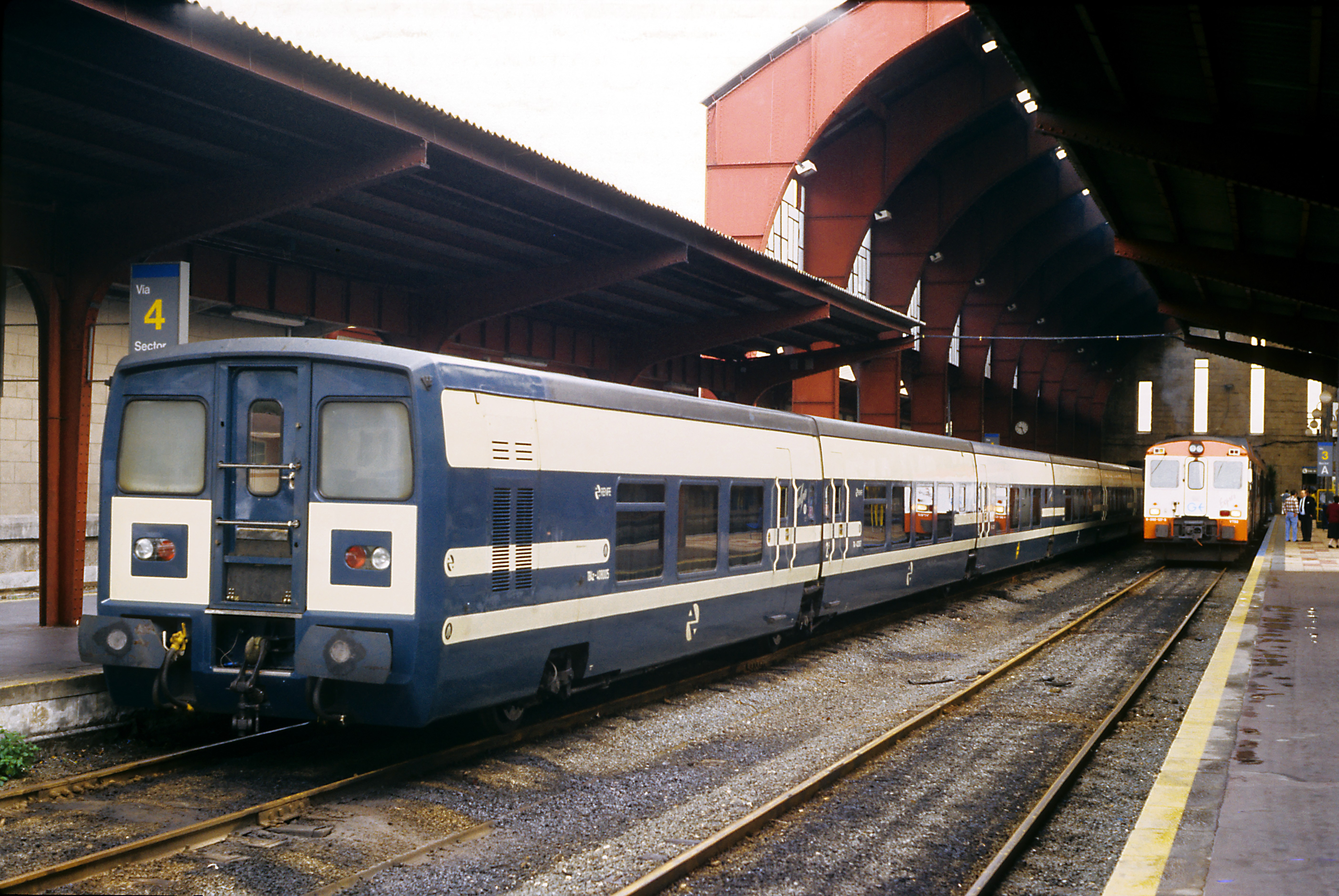 Talgo-4-Wagenzug, erkennbar an den im Vergleich zu den Folgebauarten deutlich größeren Seitenfenstern, den nach innen öffnenden Klapptüren und dem nicht umspurbaren Laufwerk. Die Talgo Pendular waren mit dem Beginn der Serienlieferung 1980 die ersten Regelfahrzeuge in Spanien ohne das alte Dreilichtschlusssignal mit zwei roten Lampen oben und einer dritten in Fahrtrichtung unten rechts (das auch bei den »Civia«-Triebzügen noch nach 2000 vorgesehen wurde). EDV-Nummern gibt es bei Renfe-Talgo-Fahrzeugen erst seit der Einführung der einheitlichen UIC-Beschriftung, die sechsstellige Talgonummer bildet seitdem die sechste bis elfte Stelle.Rechts ein Dieseltriebzug der Reihe 592.